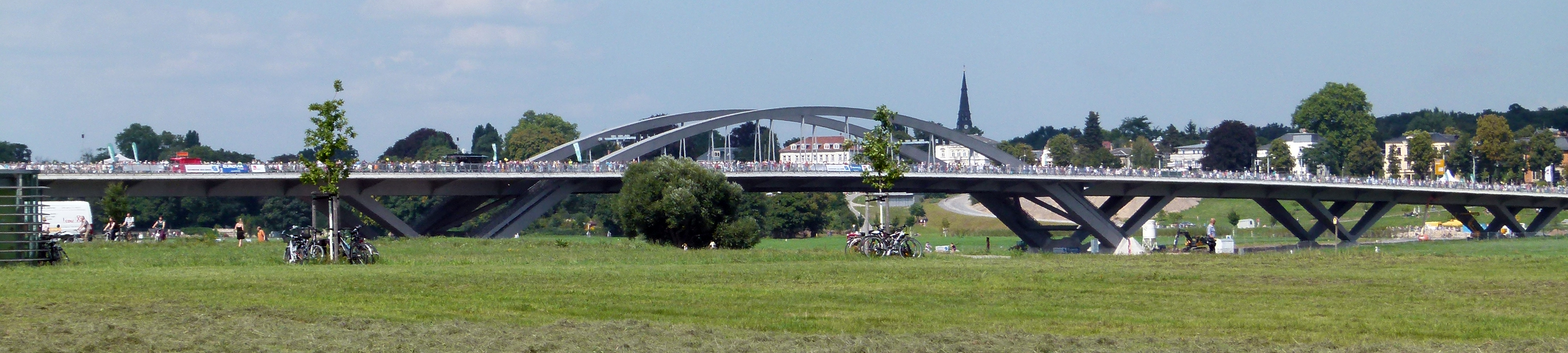 Die Waldschlößchenbrücke am Eröffnungstag - 24. August 2013 - Brückenfest, Dresden